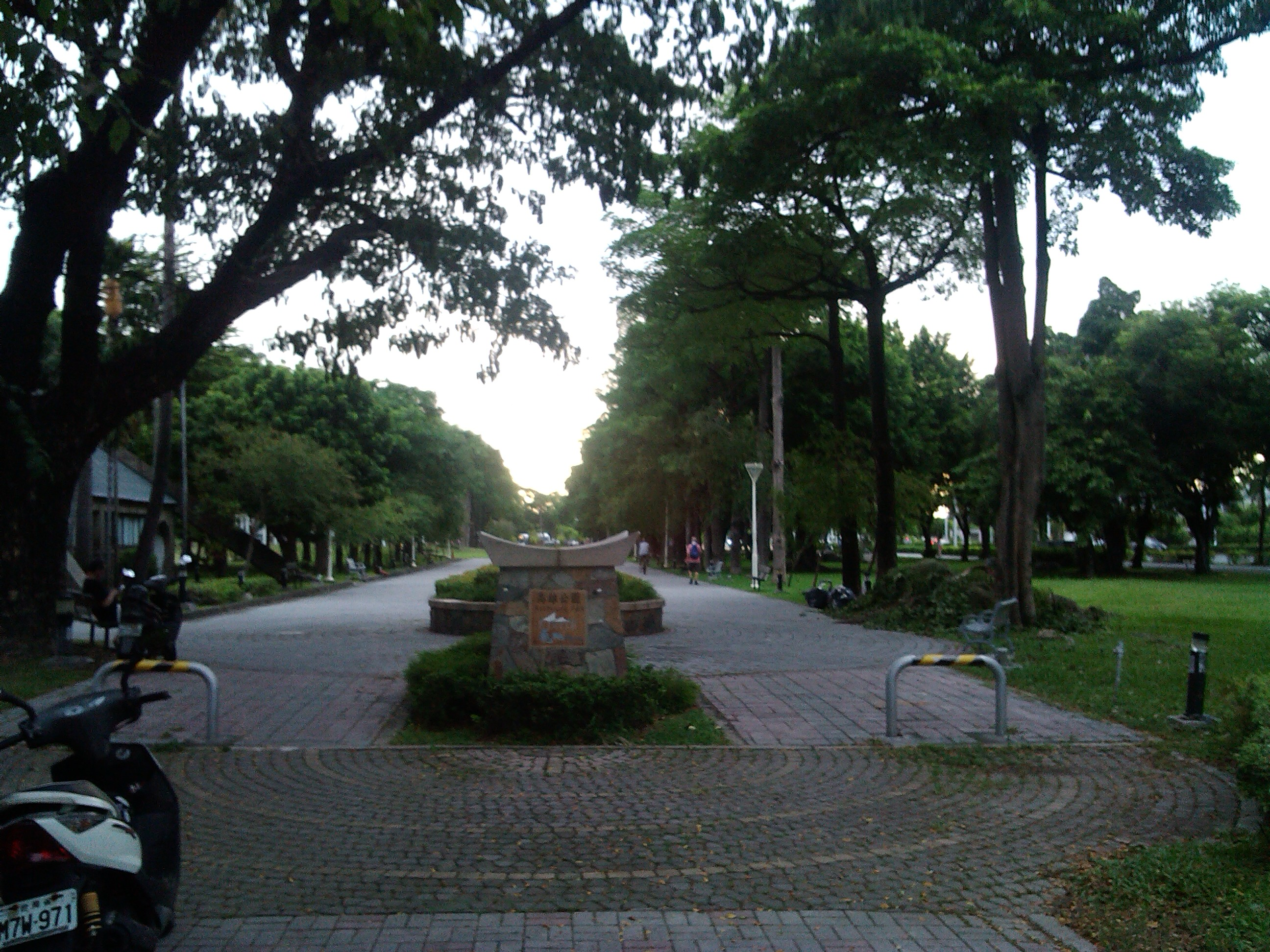 小港區沿海路(17)上 小港機場正對面